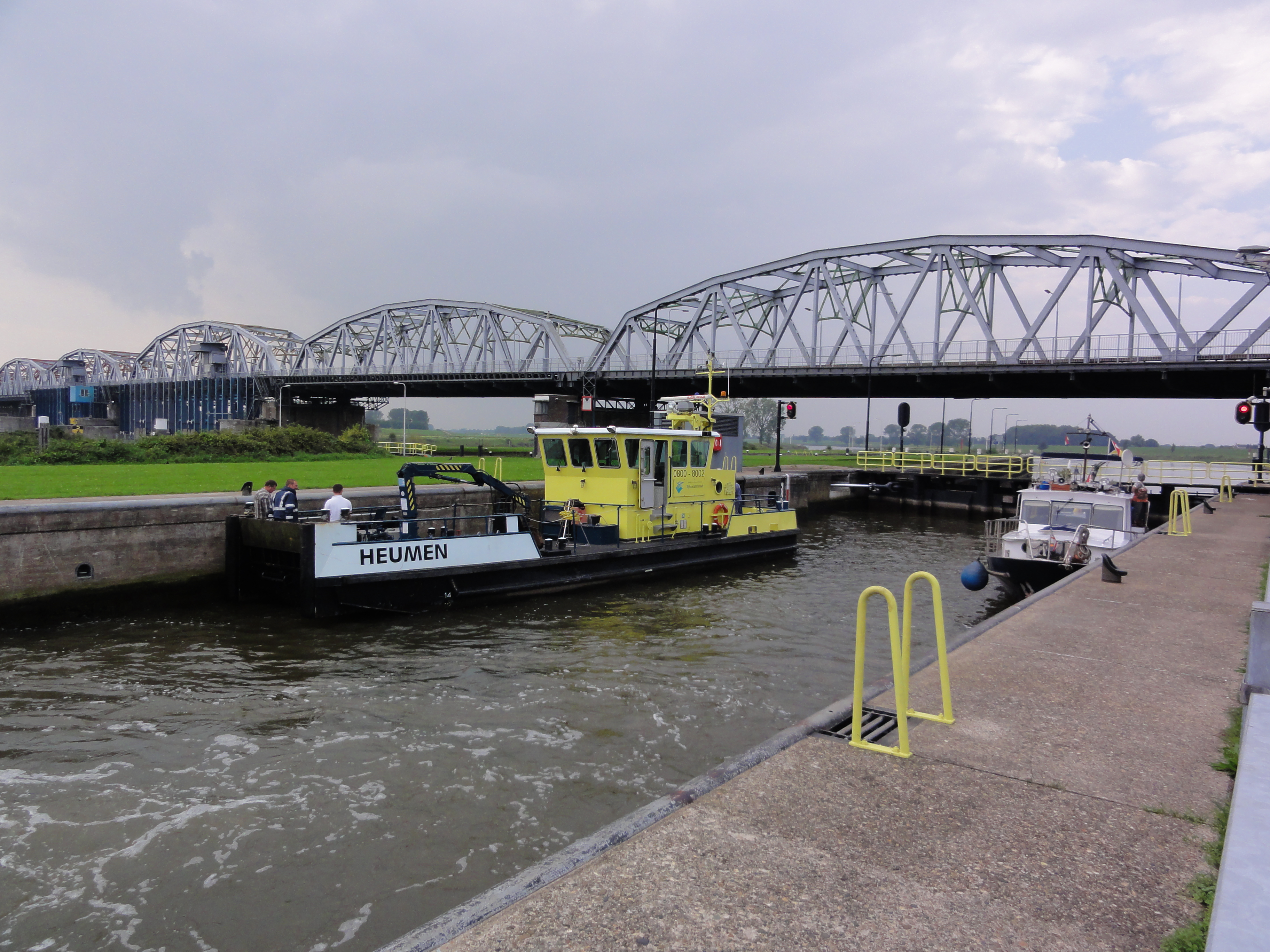 (Nederasselt (Heumen) Rijksmonument 523934 verkeersbrug met stuw en sluis.